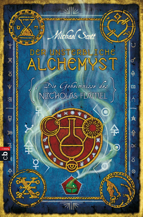 Michael Scott: Die Geheimnisse des Nicholas Flamel. Der unsterbliche Alchemyst. cbj, München 2008. DNB]